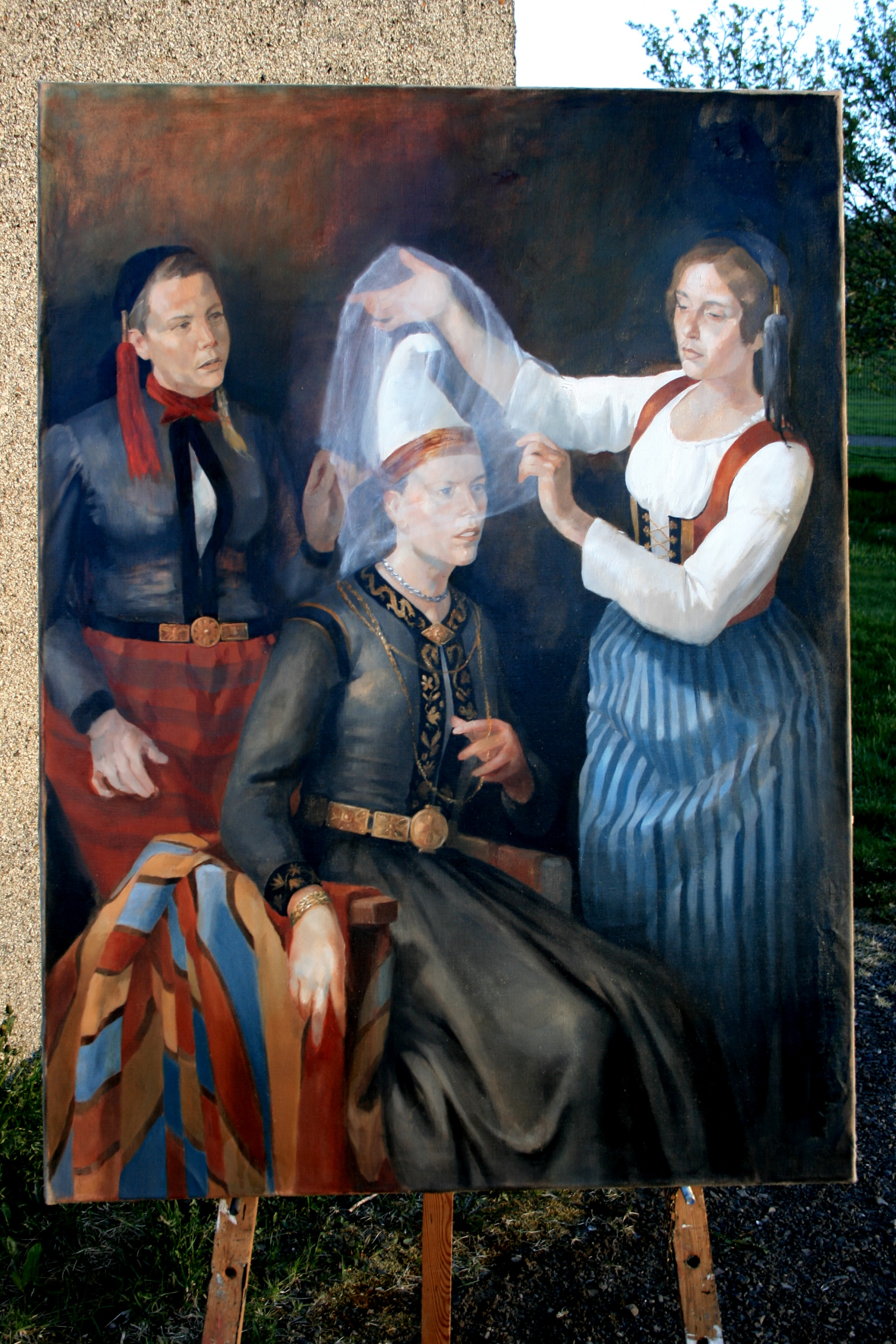 Brúðurin, málverk eftir Þránd Þórarinsson. Olía á striga.